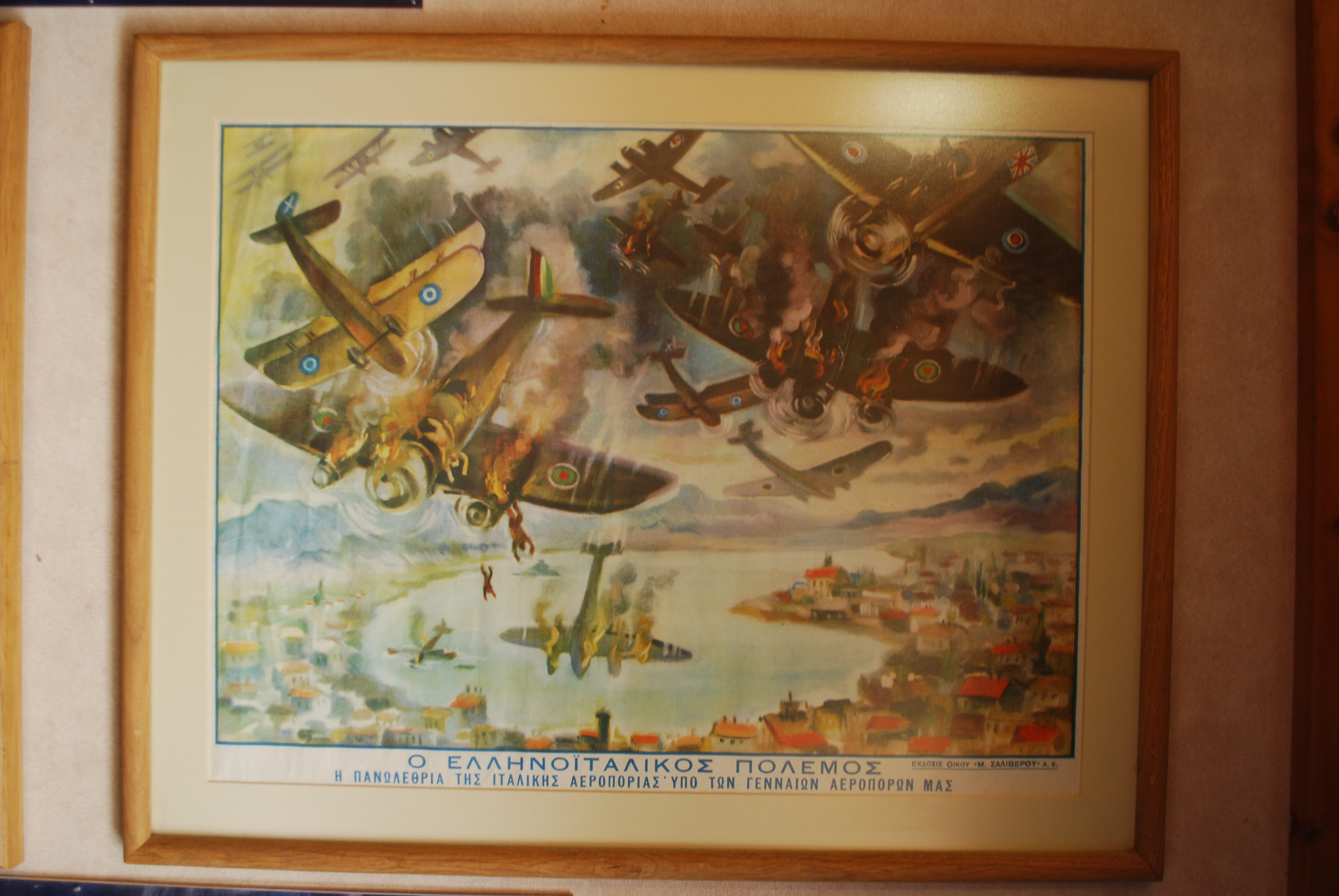 Vue du Grand Météore.